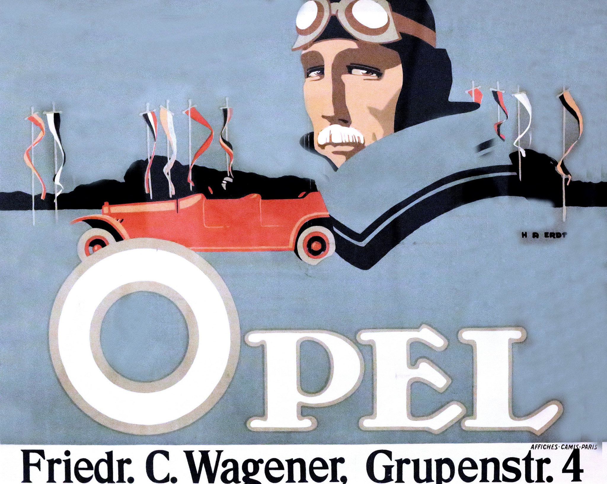 1911 von dem Künstler und Grafiker Hans Rudi Erdt geschaffenes Plakat für das Opel-Automobil, hier mit den Zusatz „Friedr.C. Wagener, Grupenstr. 4“ (die heutige Karmarschstraße) in Hannover ...